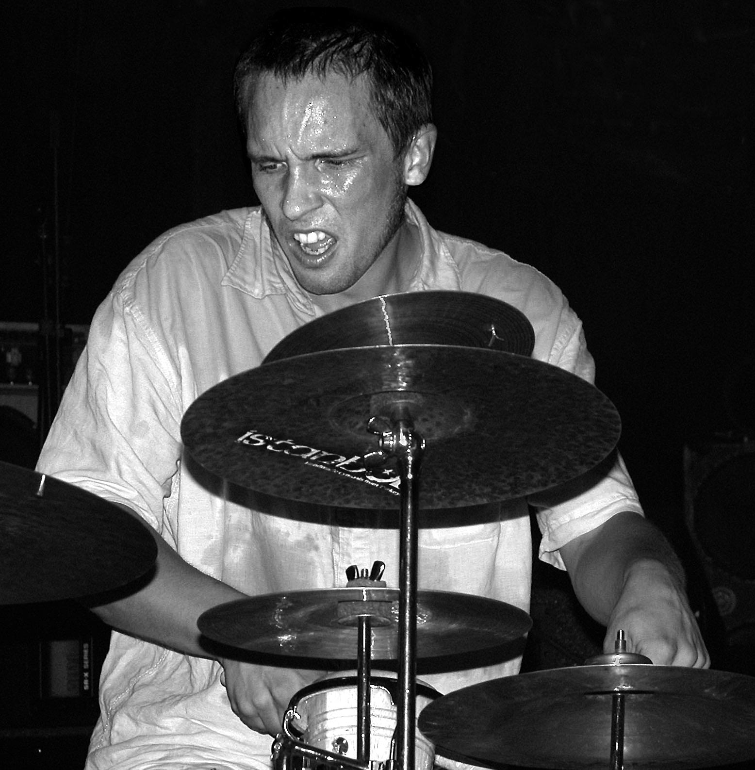 Paal Nilssen-Love